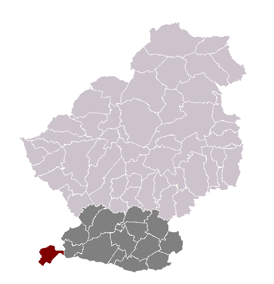 Lécluse dans son canton et son arrondissement